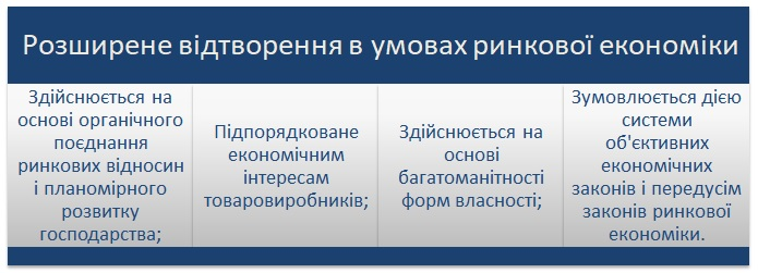 Розширене відтворення в умовах ринокової економіки